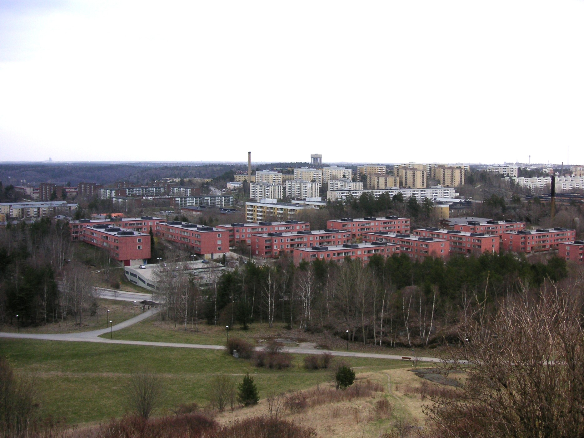 Vy mot Vårberg och (längre bort) Skärholmen, nord-nord-ost från Vårbergstoppen i Vårberg i Stockholm